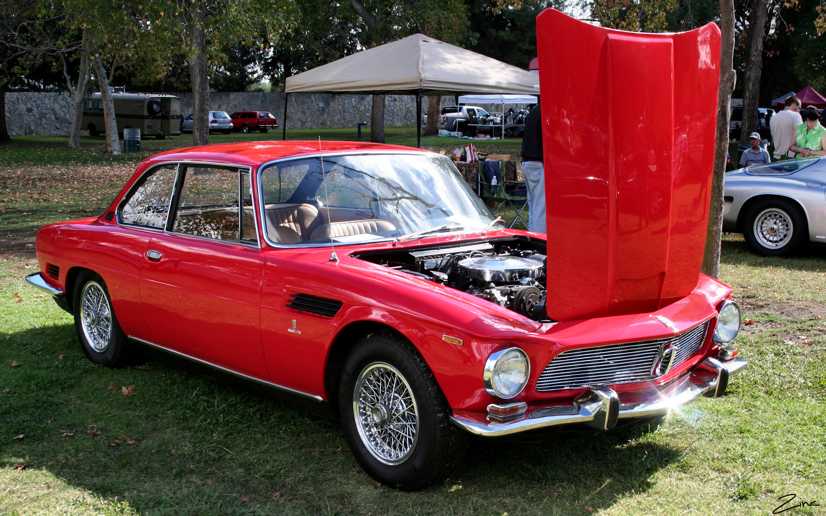 1964 Iso Rivolta GT - red - fvr